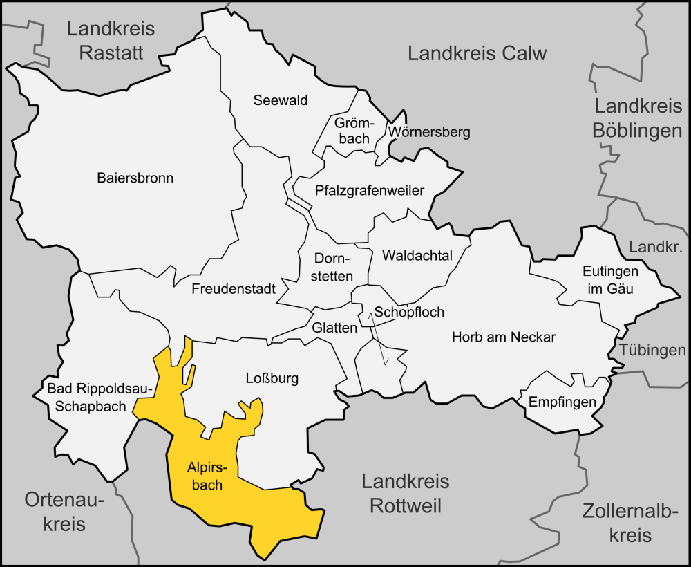 Karte der Stadt Alpirsbach im Landkreises Freudenstadt